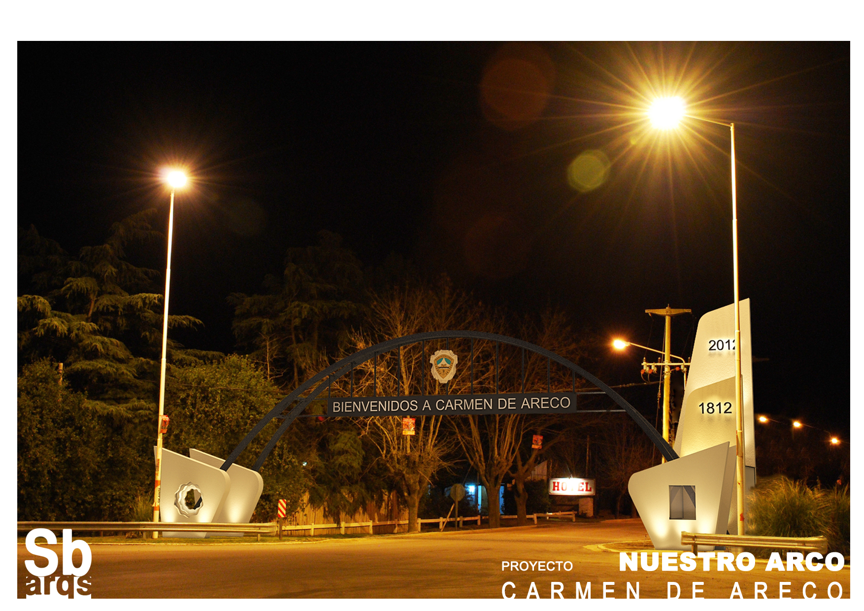 Arco de Acceso a la Ciudad de Carmen de Areco